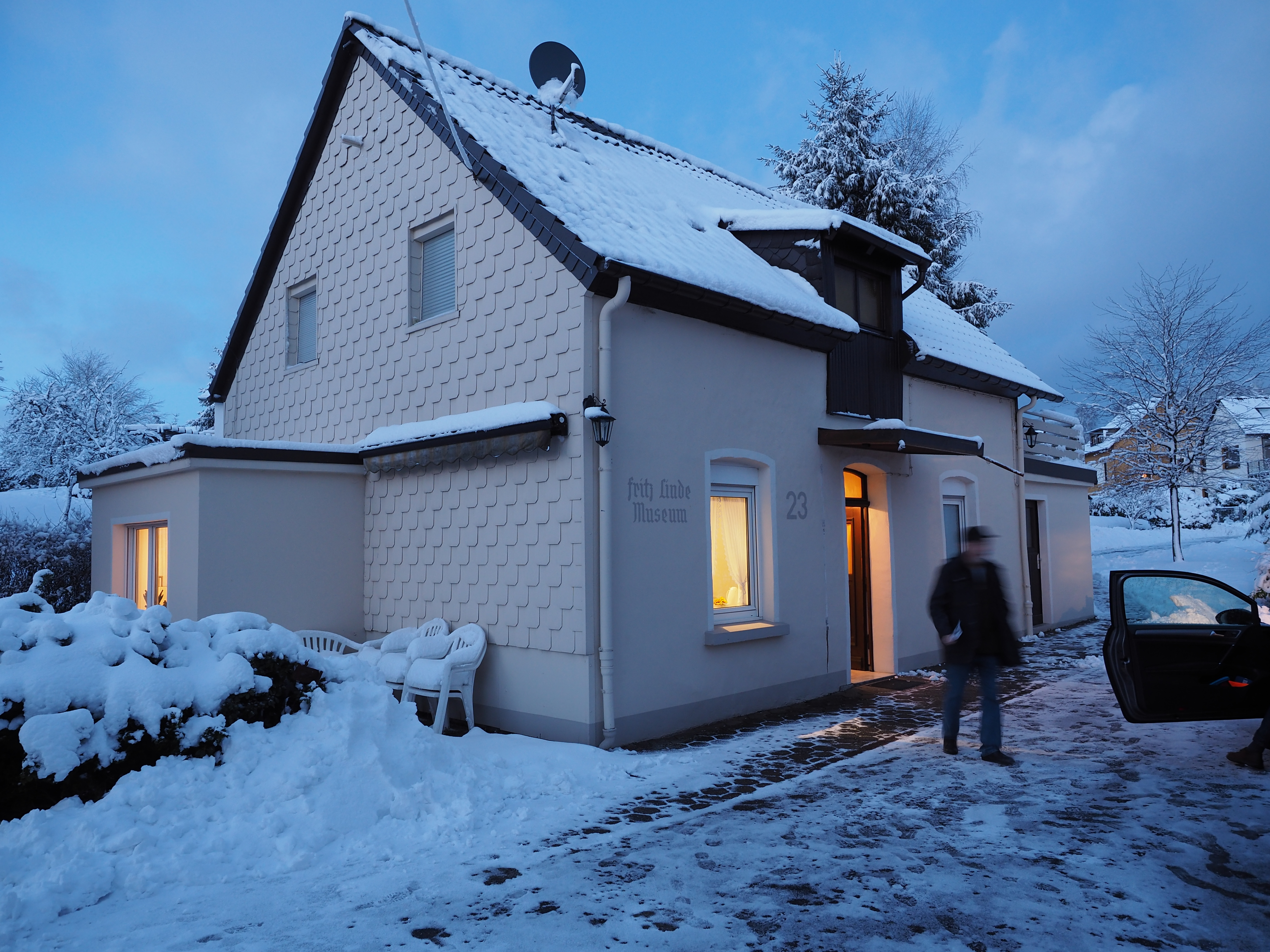 Gebäude des Fritz-Linde-Museums in Kierspe, fotografiert anlässlich des Wikipediastammtisches Sauerland in Kierspe